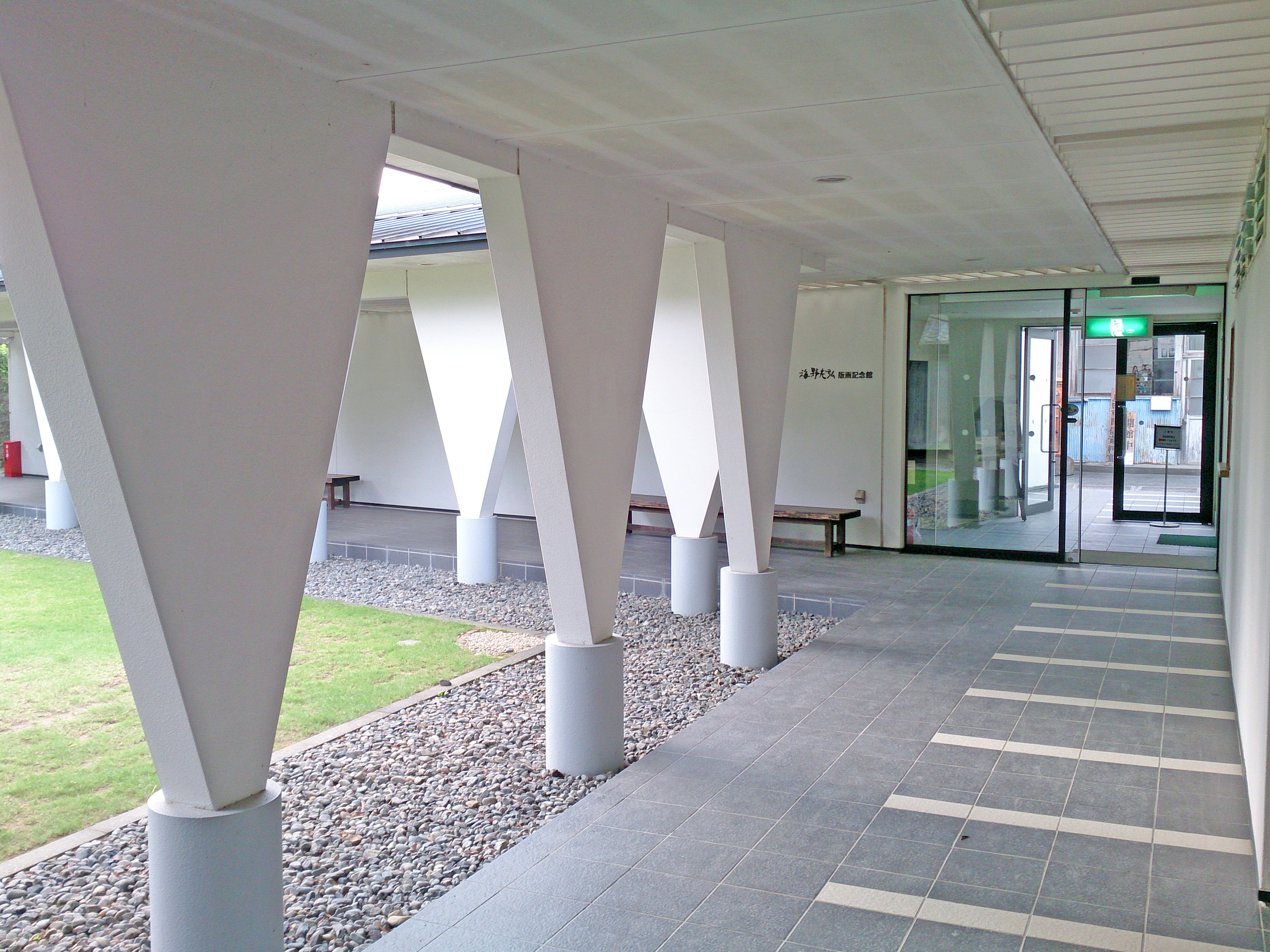 日本の版画家・海野光弘の美術館